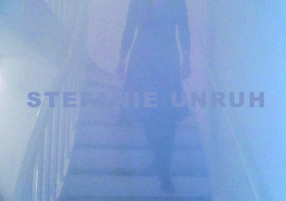 Im vernebelten Wohnräumen bewegt sich schemenhaft eine Gestalt. Manchmal tauchen seltsame Erscheinungen auf.